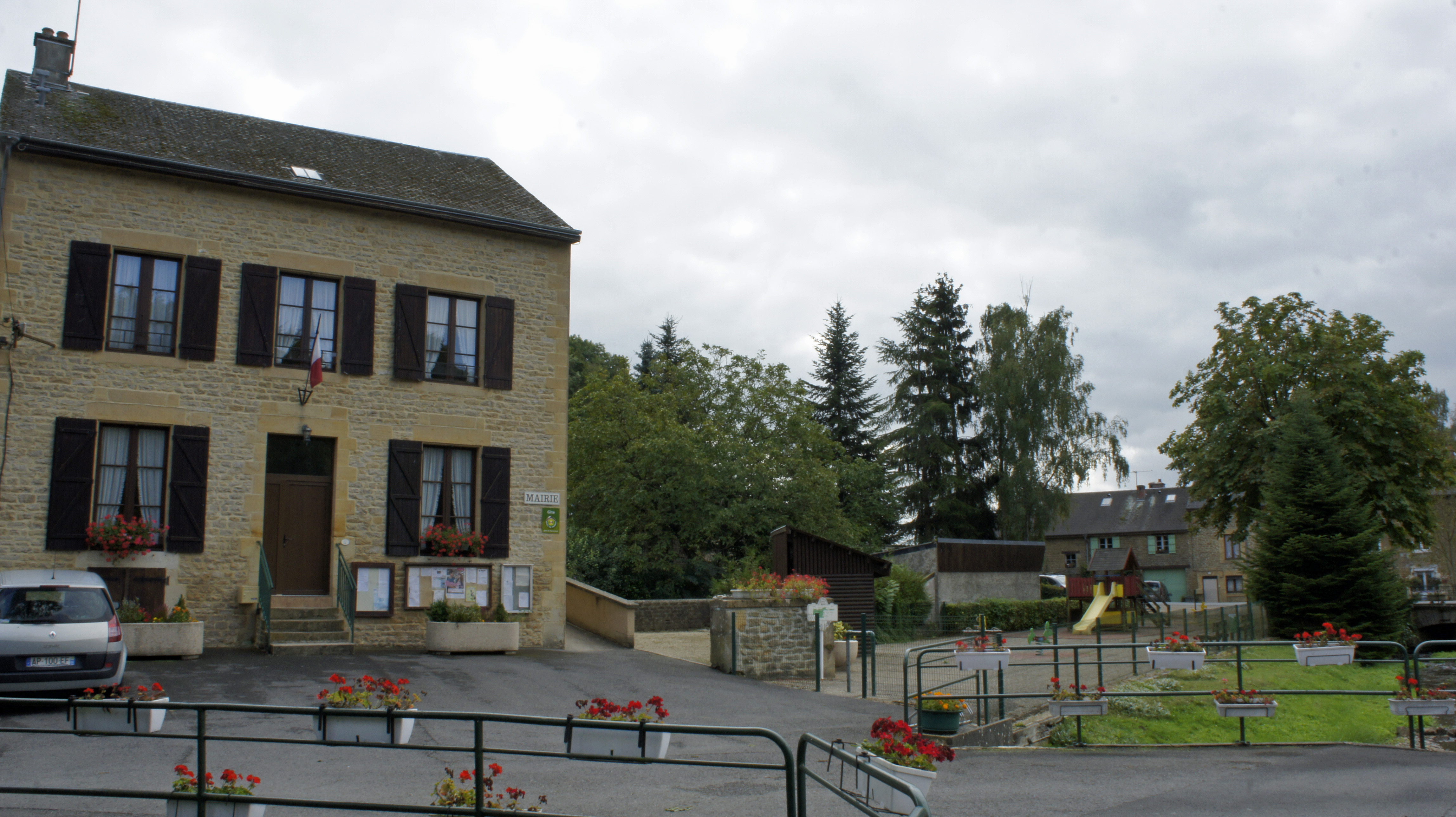 Vue de la Maison de la mairie et du ruisseau.